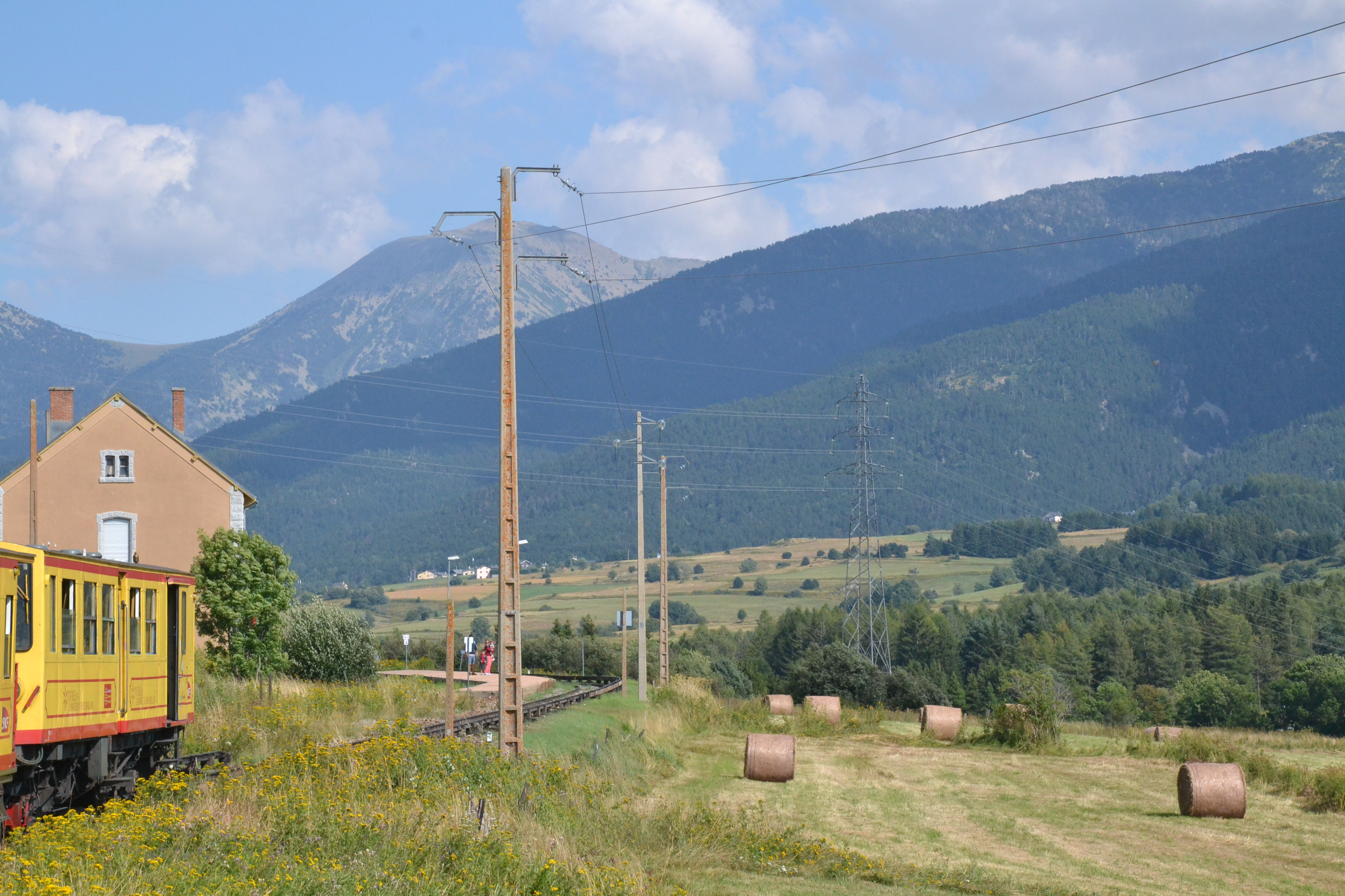 Gare de Bolquère - Eyne, ligne de Cerdagne (commune de Bolquère, Pyrénées-Orientales, France).